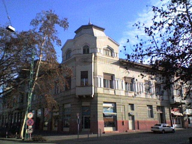 Közgazdasági Takarékpénztár épülete Kiskunfélegyházán (tervezte Karvaly Gyula, épült 1910-ben)